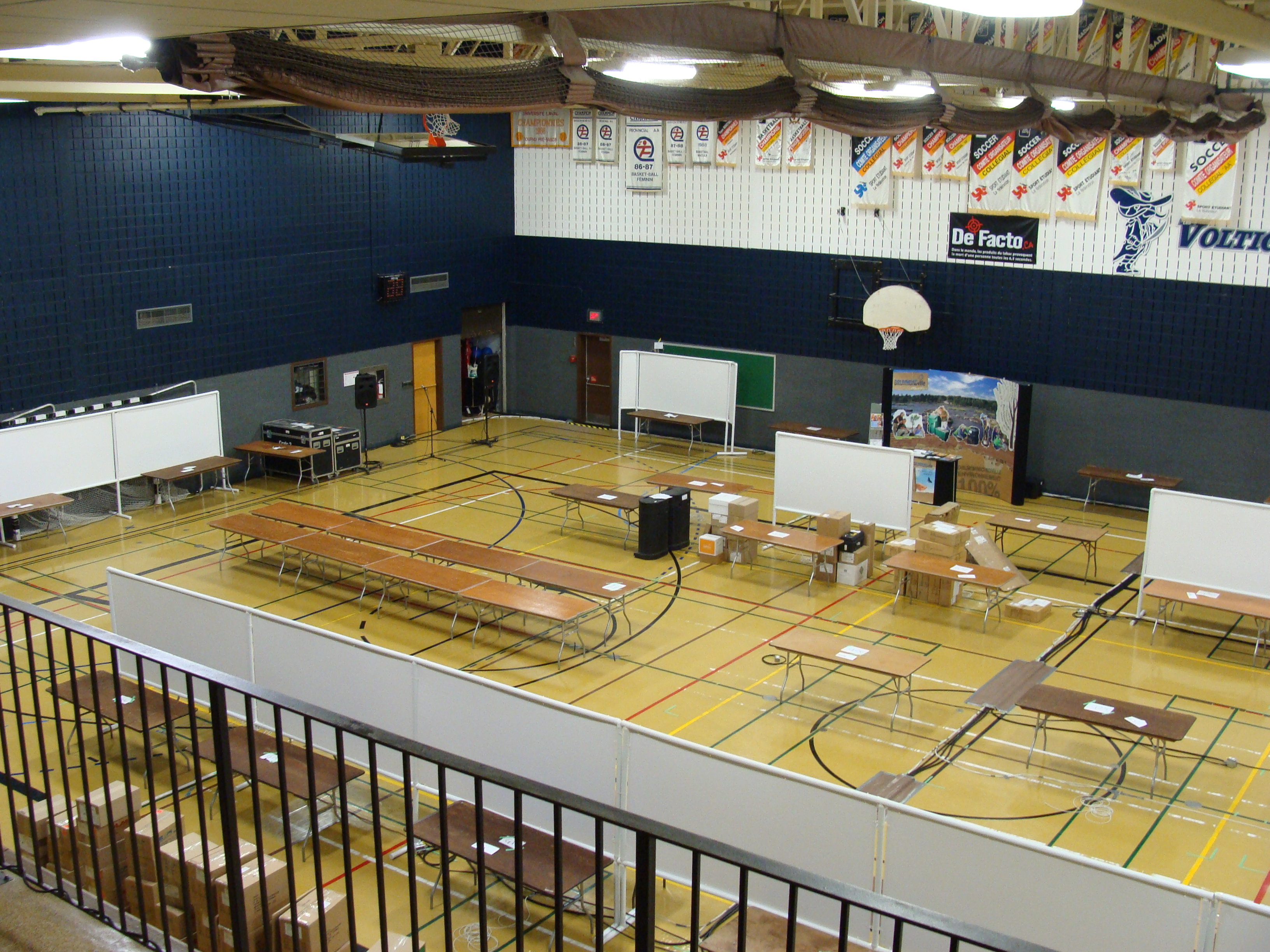 Gymnase du Cégep de Drummondville, au Québec.